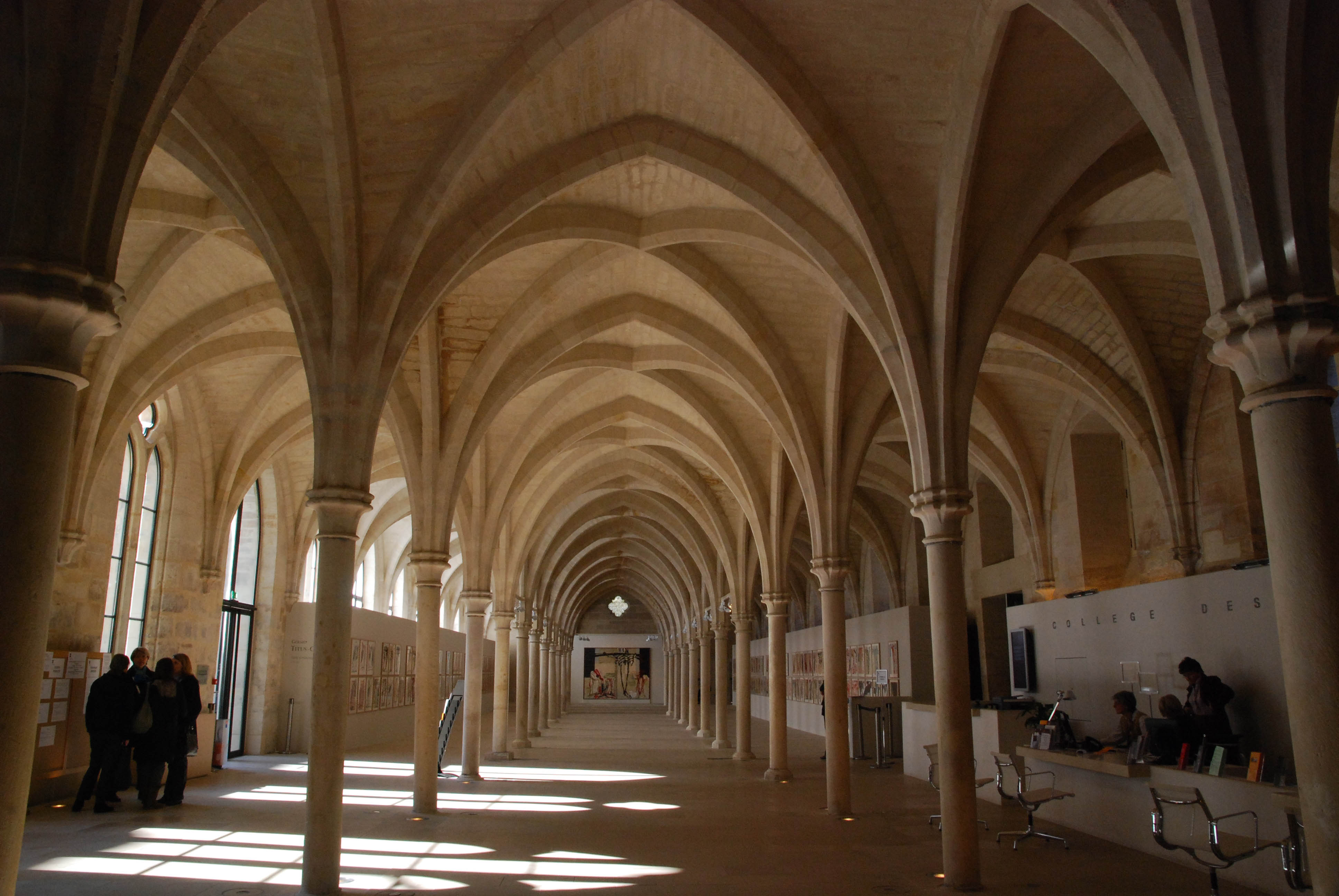 Collège des Bernardins, grande nef, 13 ième siècle, Paris